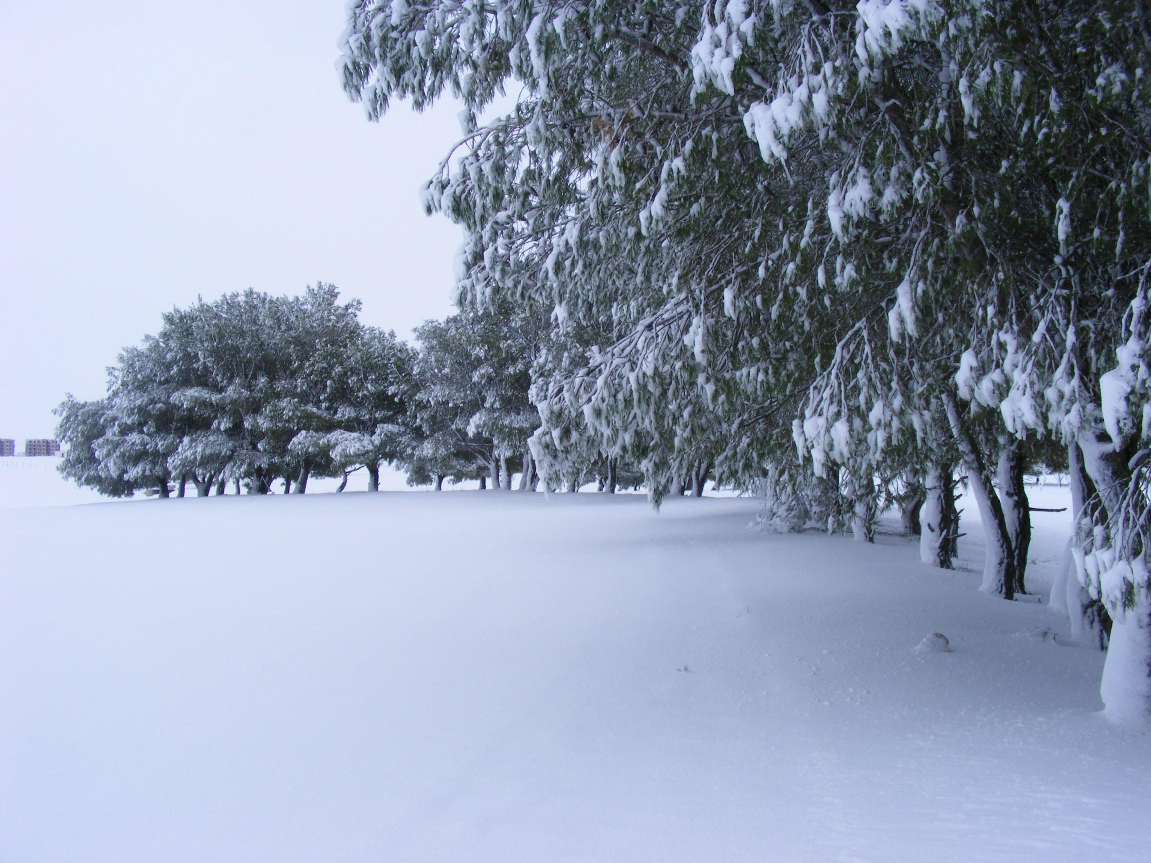 Forets Vièrges dans la neige